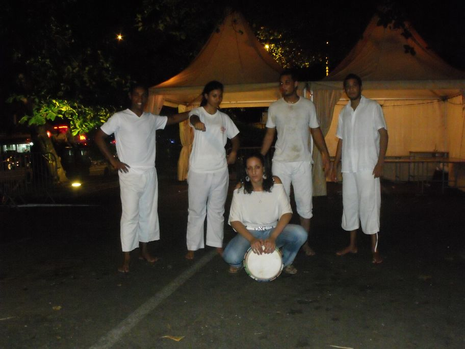 Démonstration de Moring sur la place de la plage de Saint Pierre Réunion.